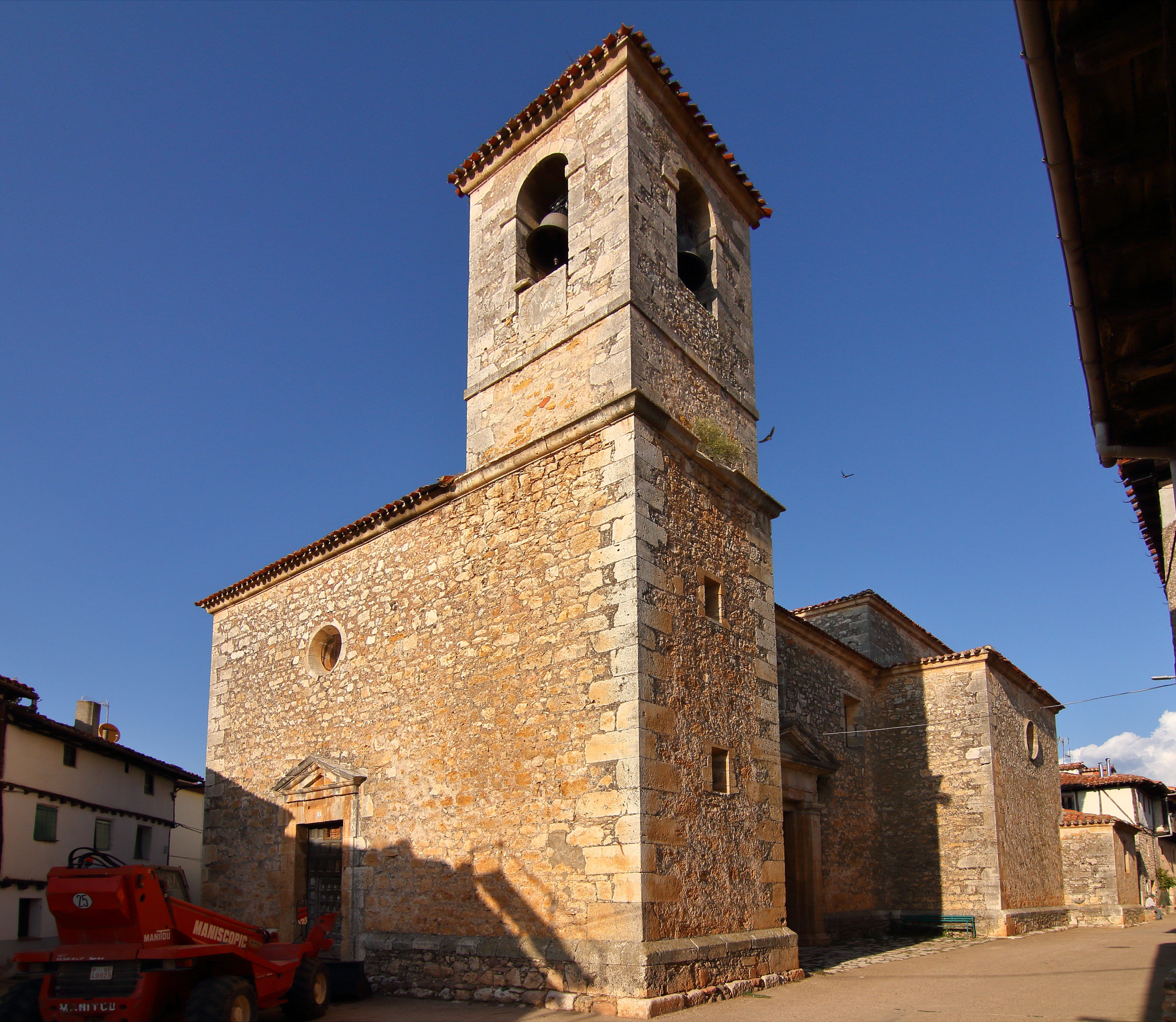 Retuerta, Iglesia de San Esteban, torre y fachada sur